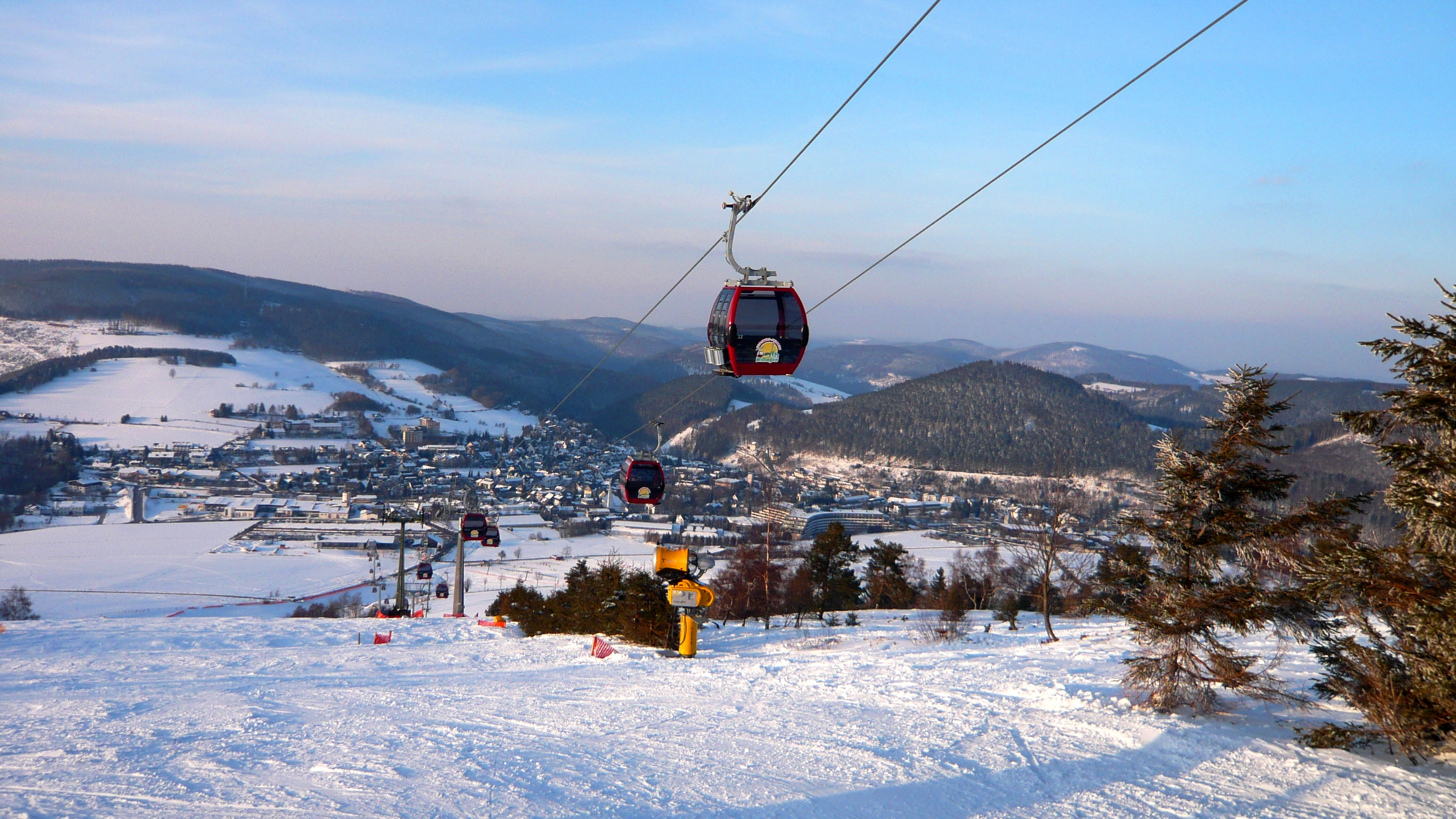 Blick vom Nordhang des Ettelsbergs auf Willingen (Upland) und die Ettelsberg-Seilbahn, aufgenommen am Ostersonntag 2008